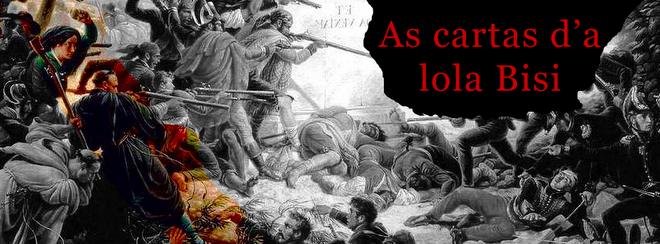 Aragonés: Cartel d'a obra